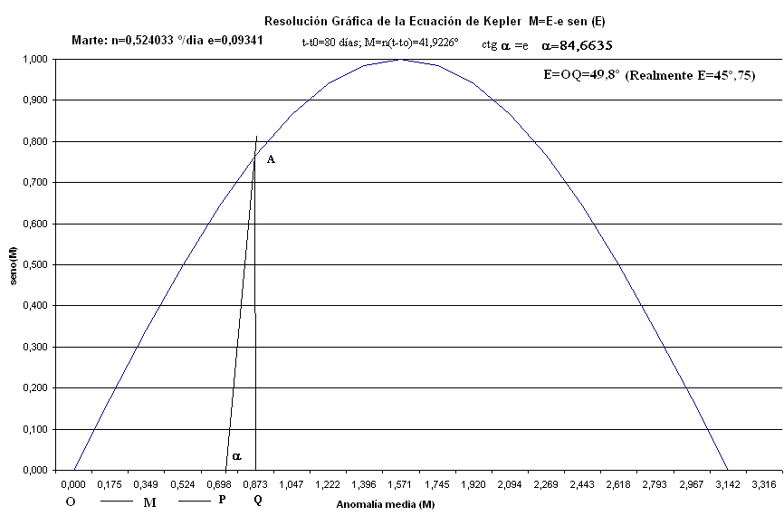 Método gráfico de resolver la ecuación de Kepler. En el gráfico de dibuja una sinusoide. Sobre el eje x se mide M=OP y se dibuja una recta con inclinación sobre x tal que la cotangente sea e. E resulta ser OQ Aplicada para Marte T=686,98 días e=0,09341 y 80 días tras el paso por el perihelio. La anomalía media vale M=41,9226 y la a. excéntrica sale E=49,8 cuando debería salir 45,75.